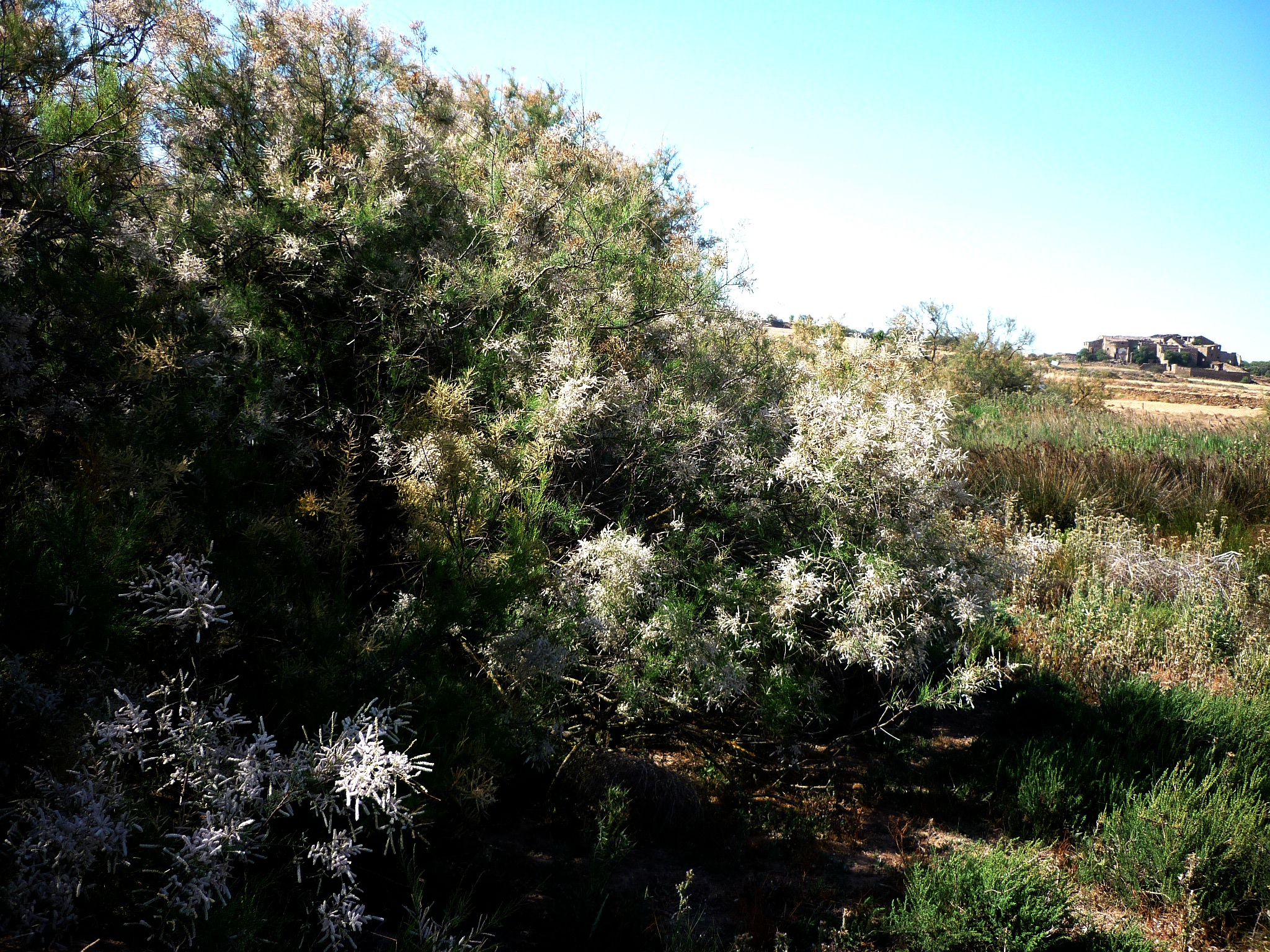 Salades de Conill (Urgell): els tamarius ("tamarix canariensis") ocupen els marges de separació. This is a a photo of a wetland in Catalonia, Spain, with id: IZHC-18003801